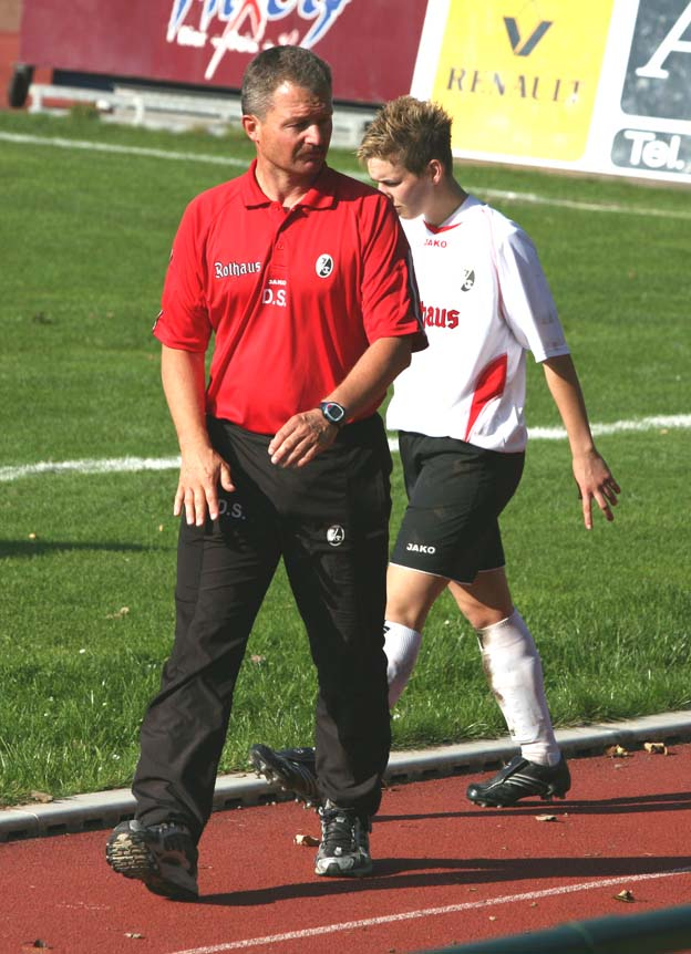 Dietmar Sehrig beim Bundesligaspiel FFC Brauweiler Pulheim vs. SC Freiburg am 15.10.2006 (Endstand 0:2) - im Hintergrund Sandra Schmidt.